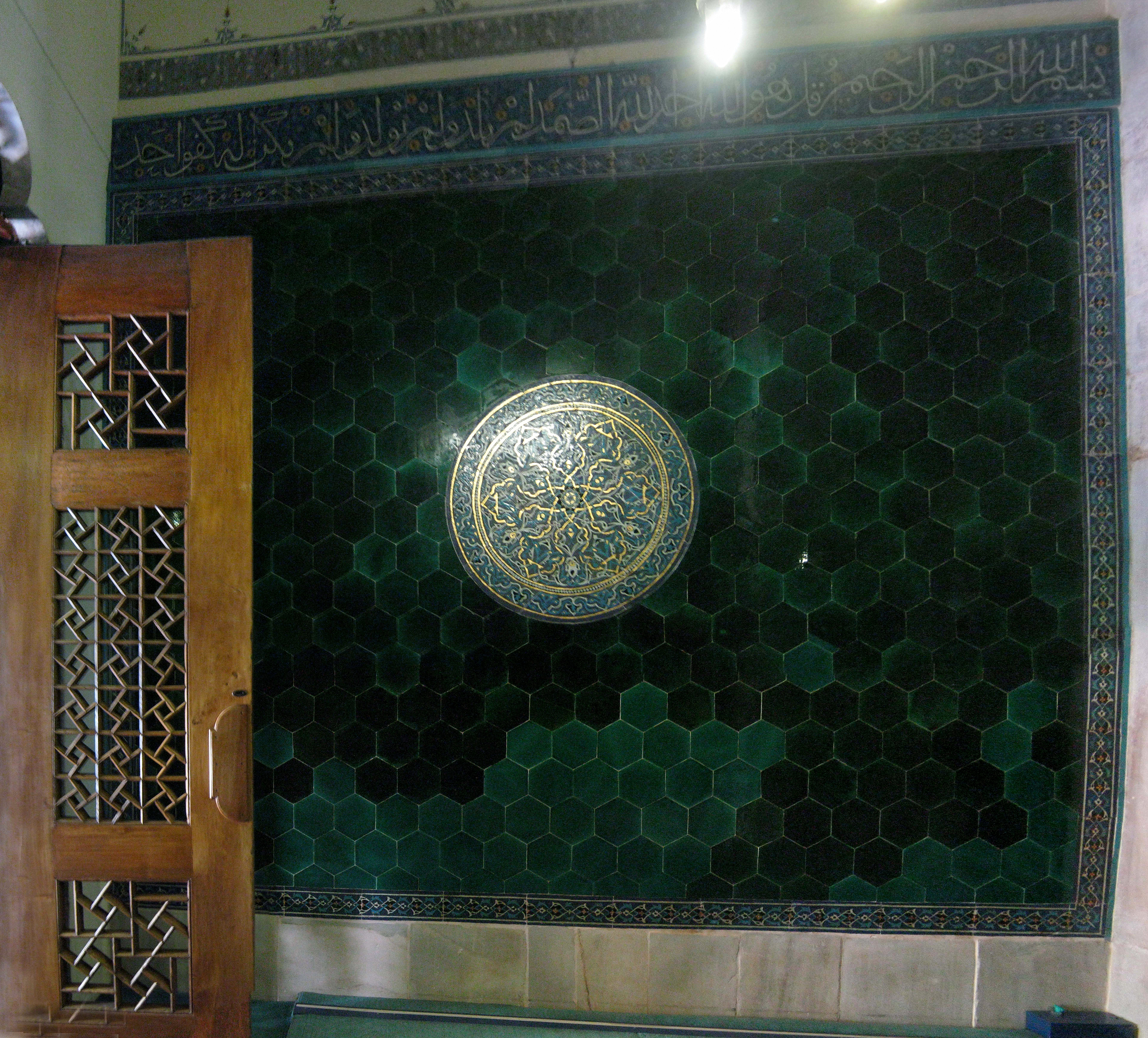 YEŞİL CAMİİ mosque YEŞİL ÇİNİLERİ